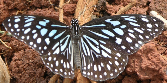 Tirumala septentrionis, adult, India